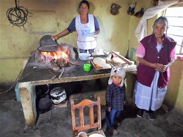 Familia achiutleca preparando el desayuno.